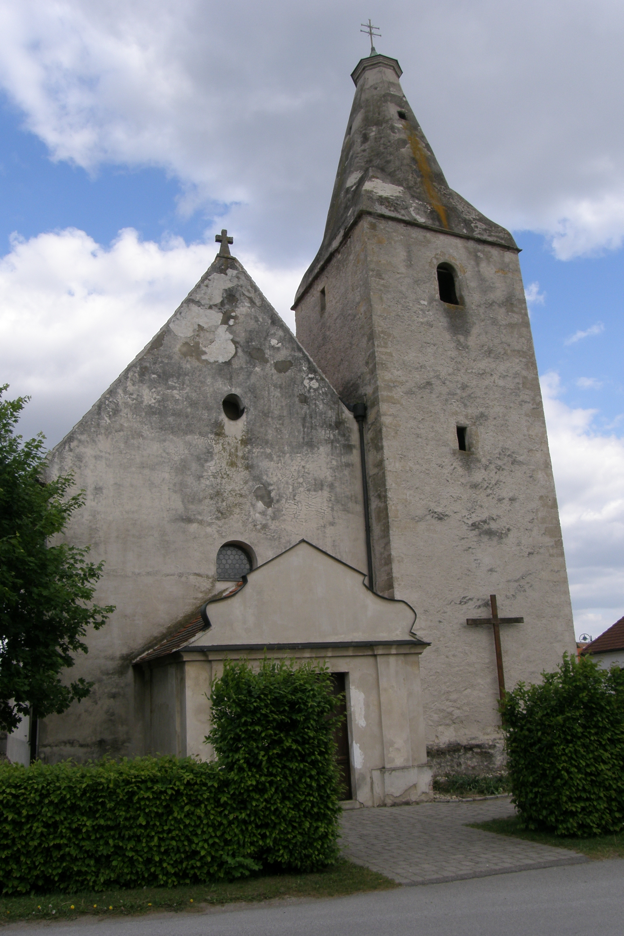 Kath. Pfarrkirche hl. Nikolaus